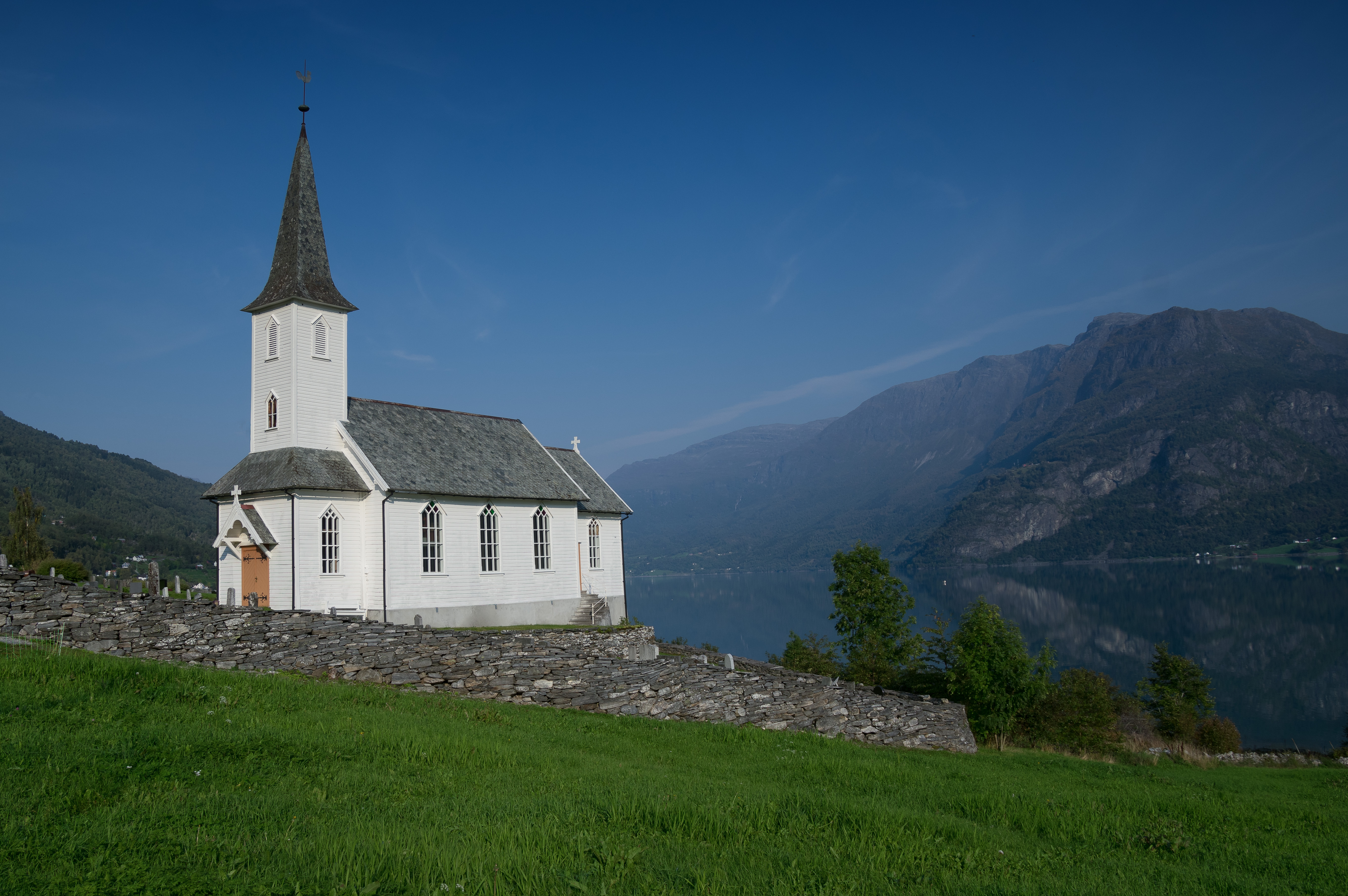 Nes kyrkje i Luster.